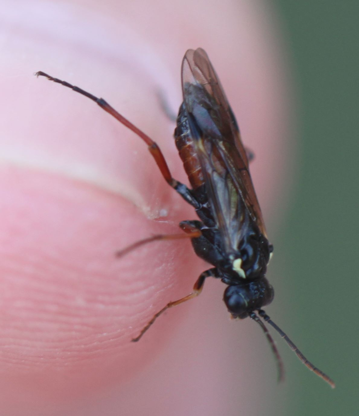 Pflanzenwespe Aglaostigma aucupariae am 11. April 2019 in der Schwetzinger Hardt an Zypressenwolfsmilch